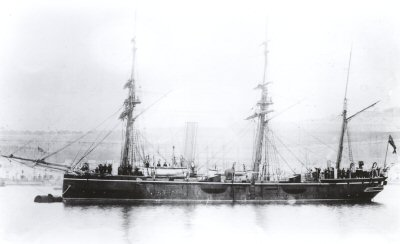 HMS Melita at buoy in Malta.